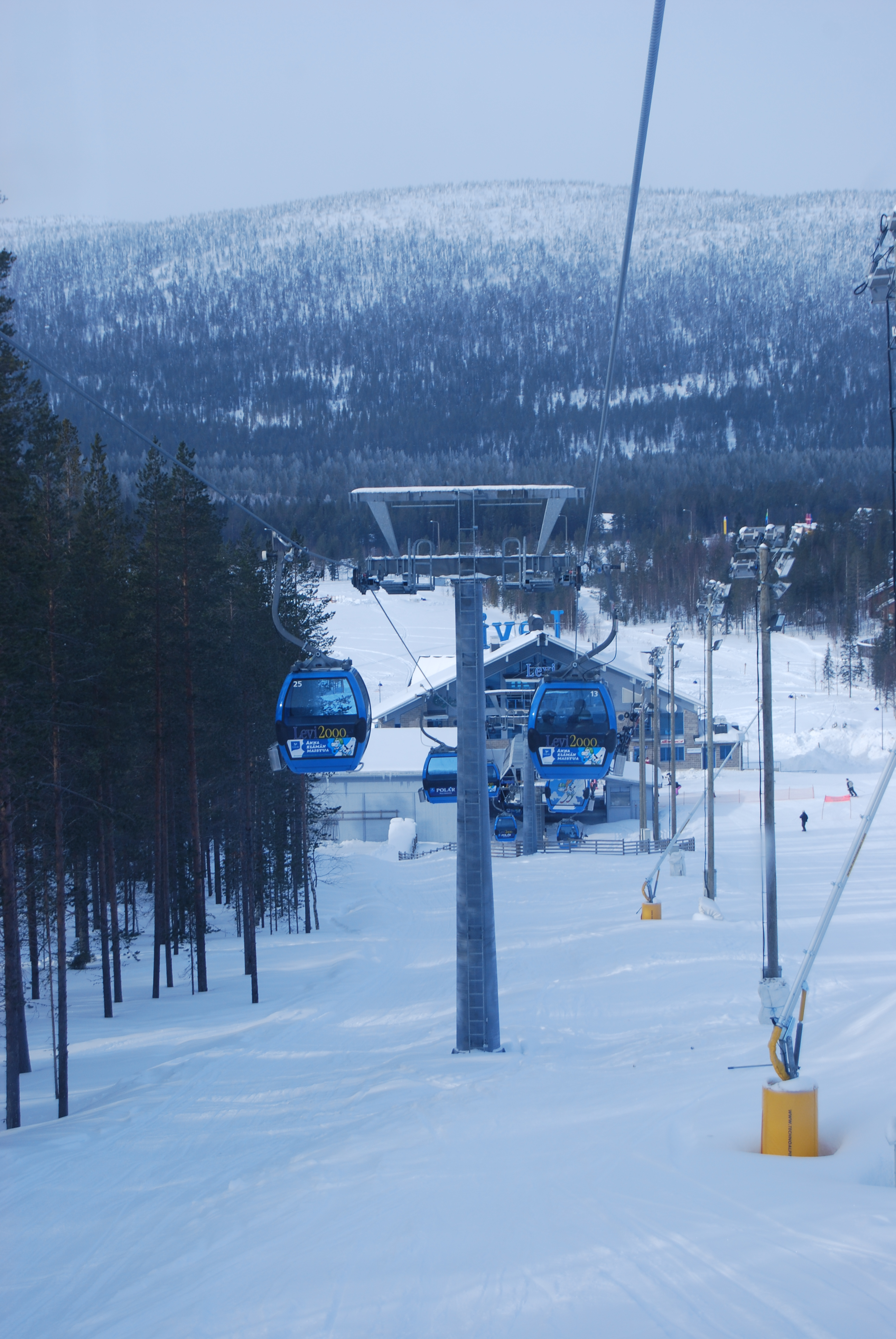 Kuva Levin Gondolihissistä.